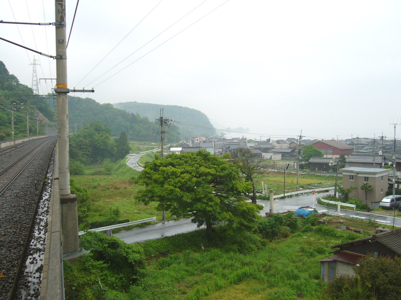 北小松駅上りホーム北端から北望 カーブしながら近づいてくる道路（木の陰）は、江若鉄道の廃線跡